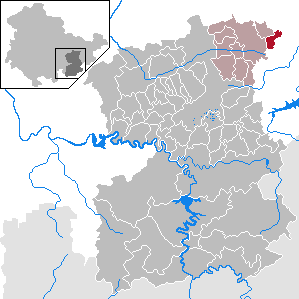 Mittelpöllnitz in Thuringia - Saale-Orla-Kreis